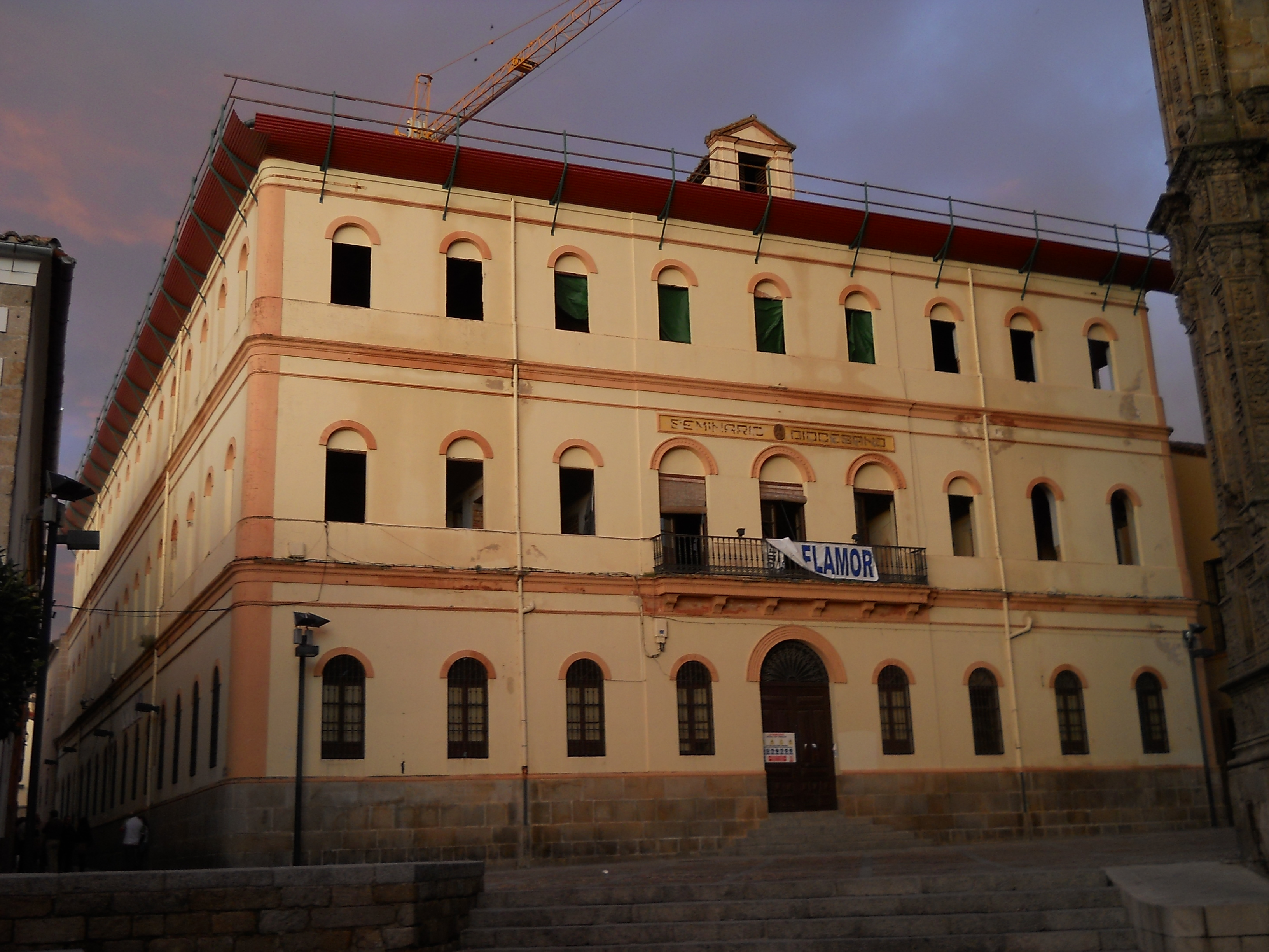 Seminario diocesano, Plasencia, Cáceres, España